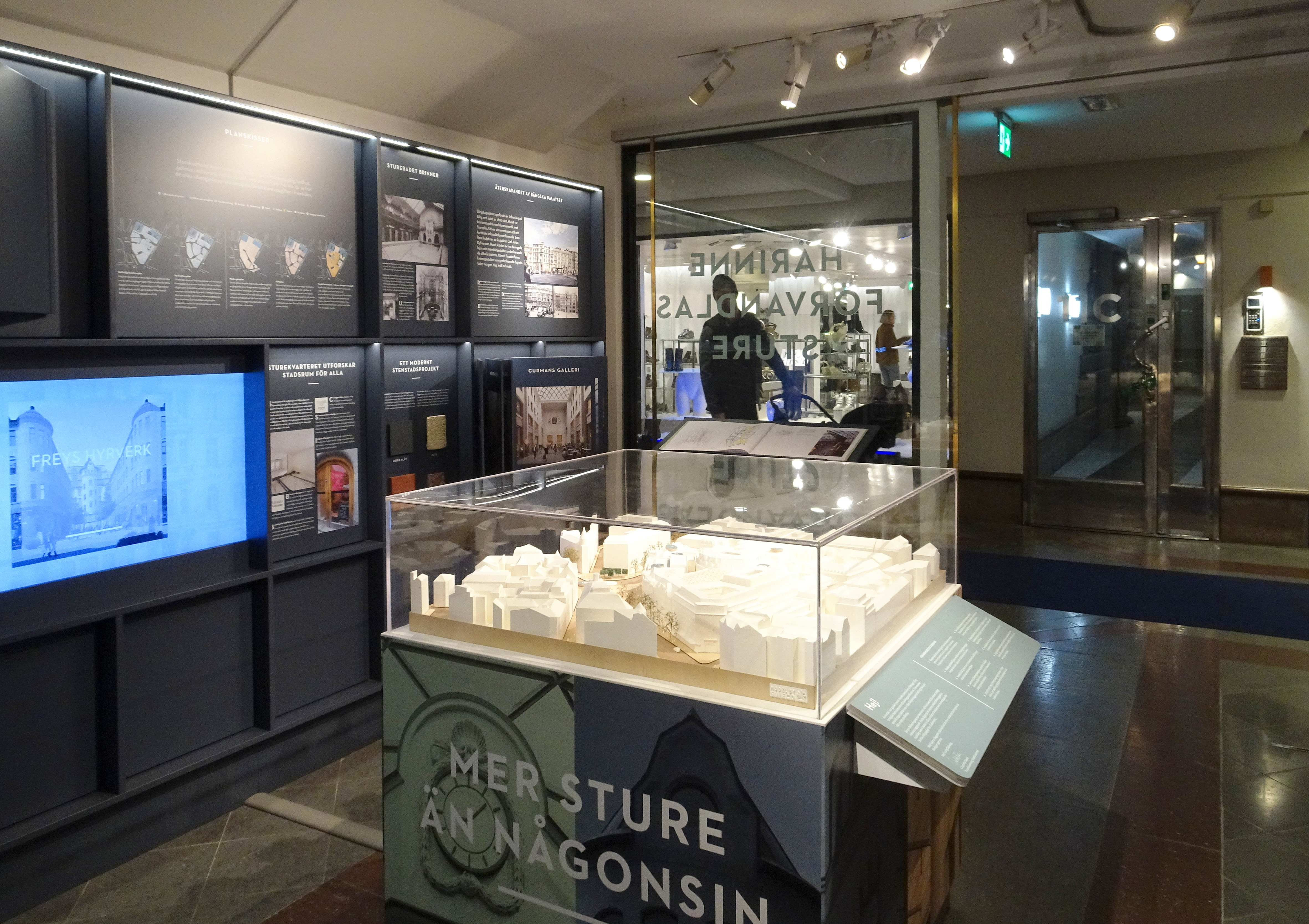 Sturegallerian, info ombyggnad